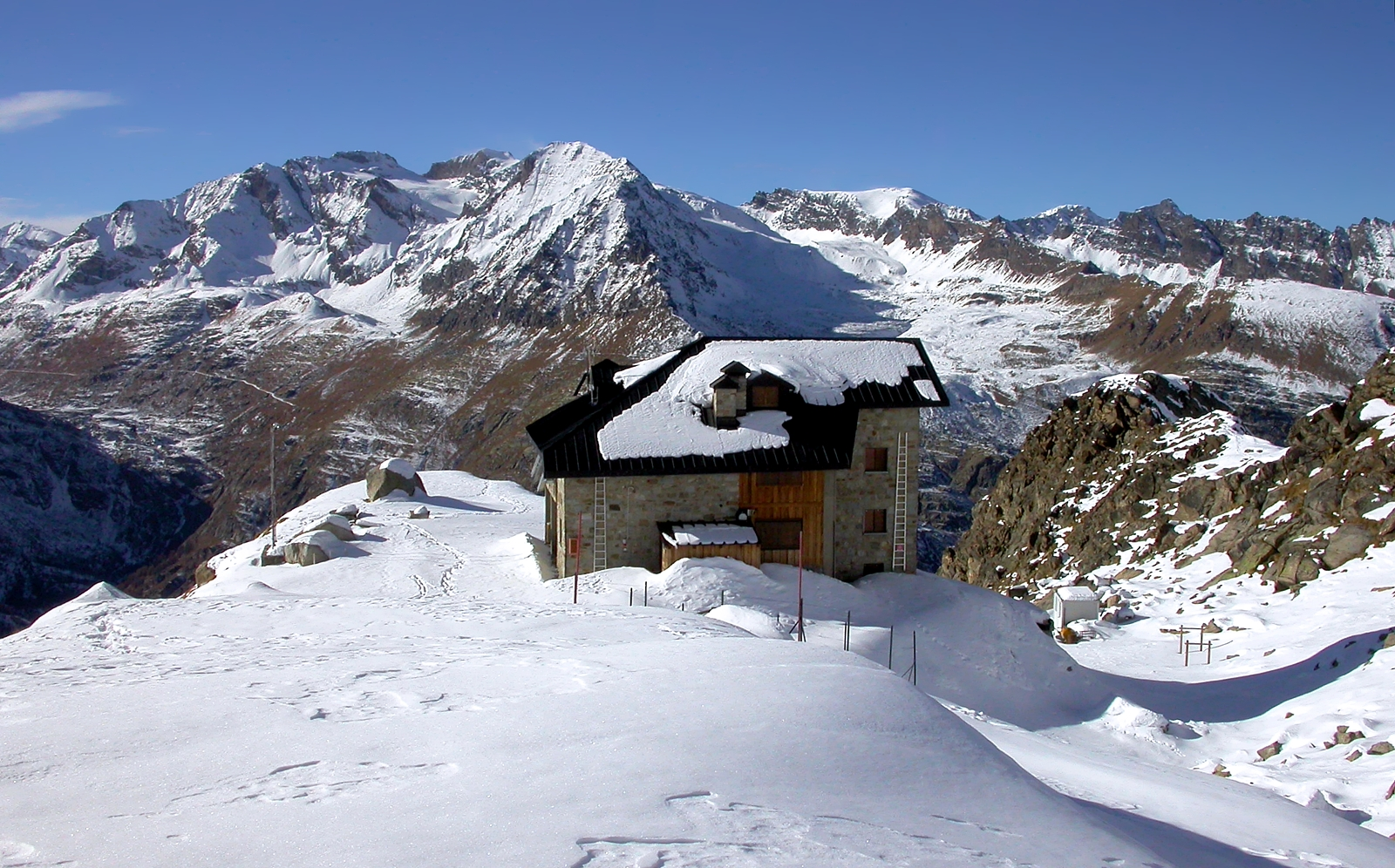 Il rifugio Federico Chabod - Alpi Graie - Italy